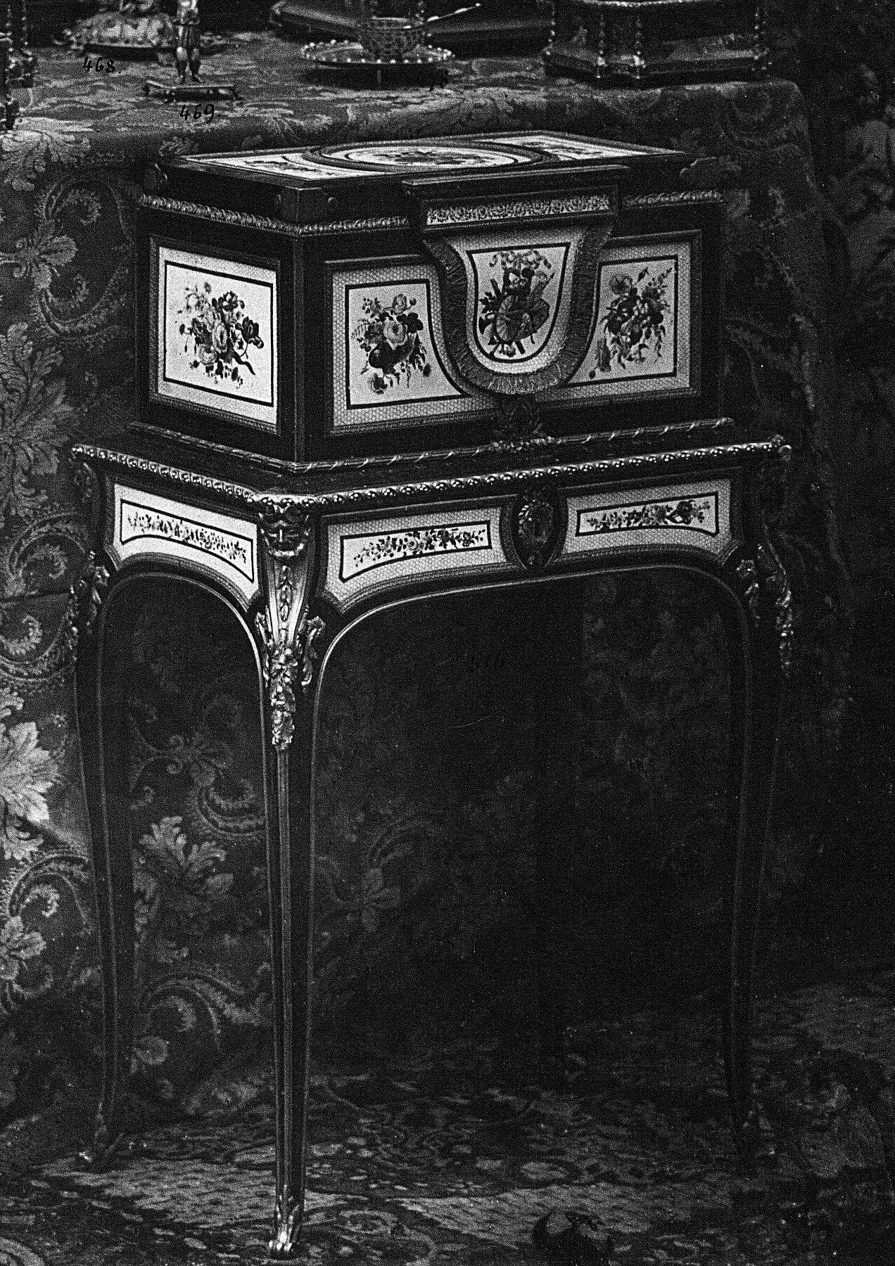 Photograph (detail)